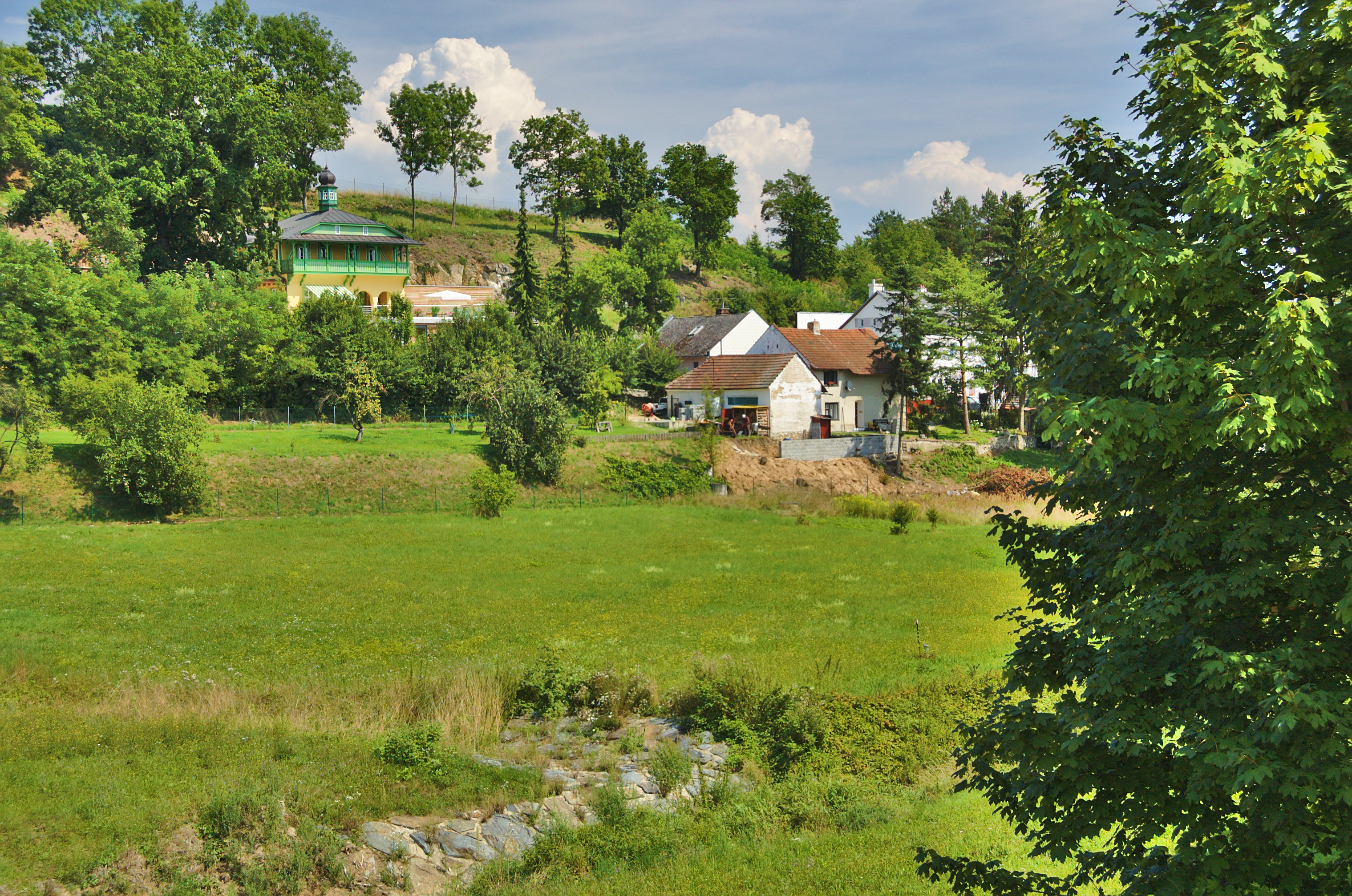 Vstup do jeskyní, Mladeč, okres Olomouc